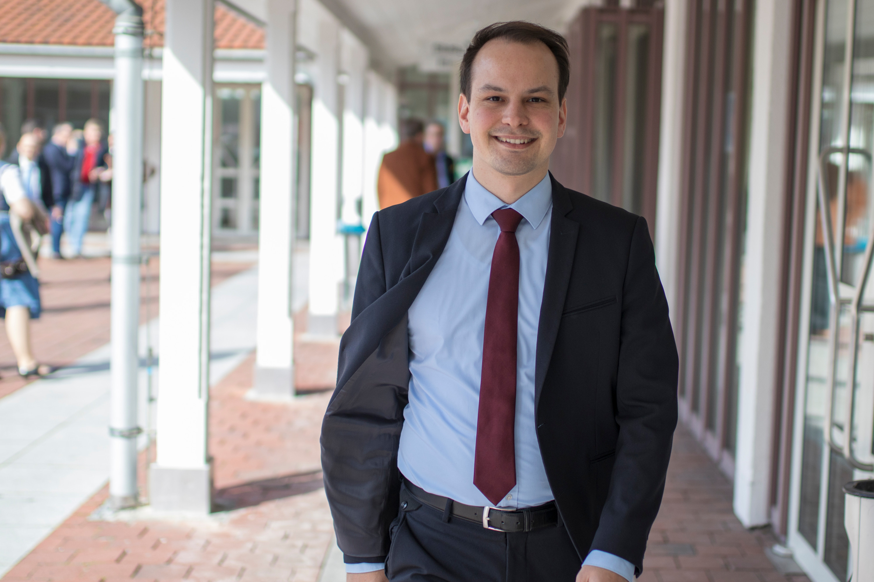 Matthias Fischbach geht in einem Anzug auf die Kamera zu. Er trägt ein blaues Hemd mit roter Krawatte. Das Foto ist in einer Einkaufspassage aufgenommen.